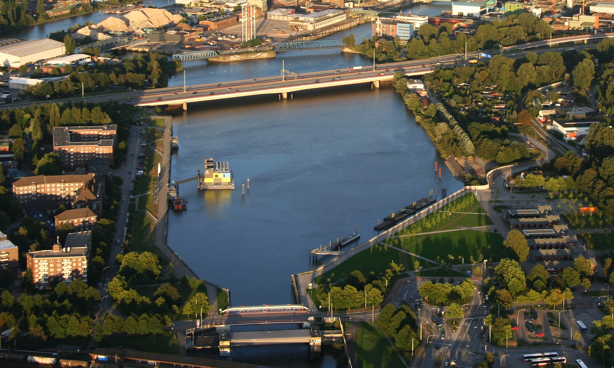 Müggenburger Zollhafen, Peute